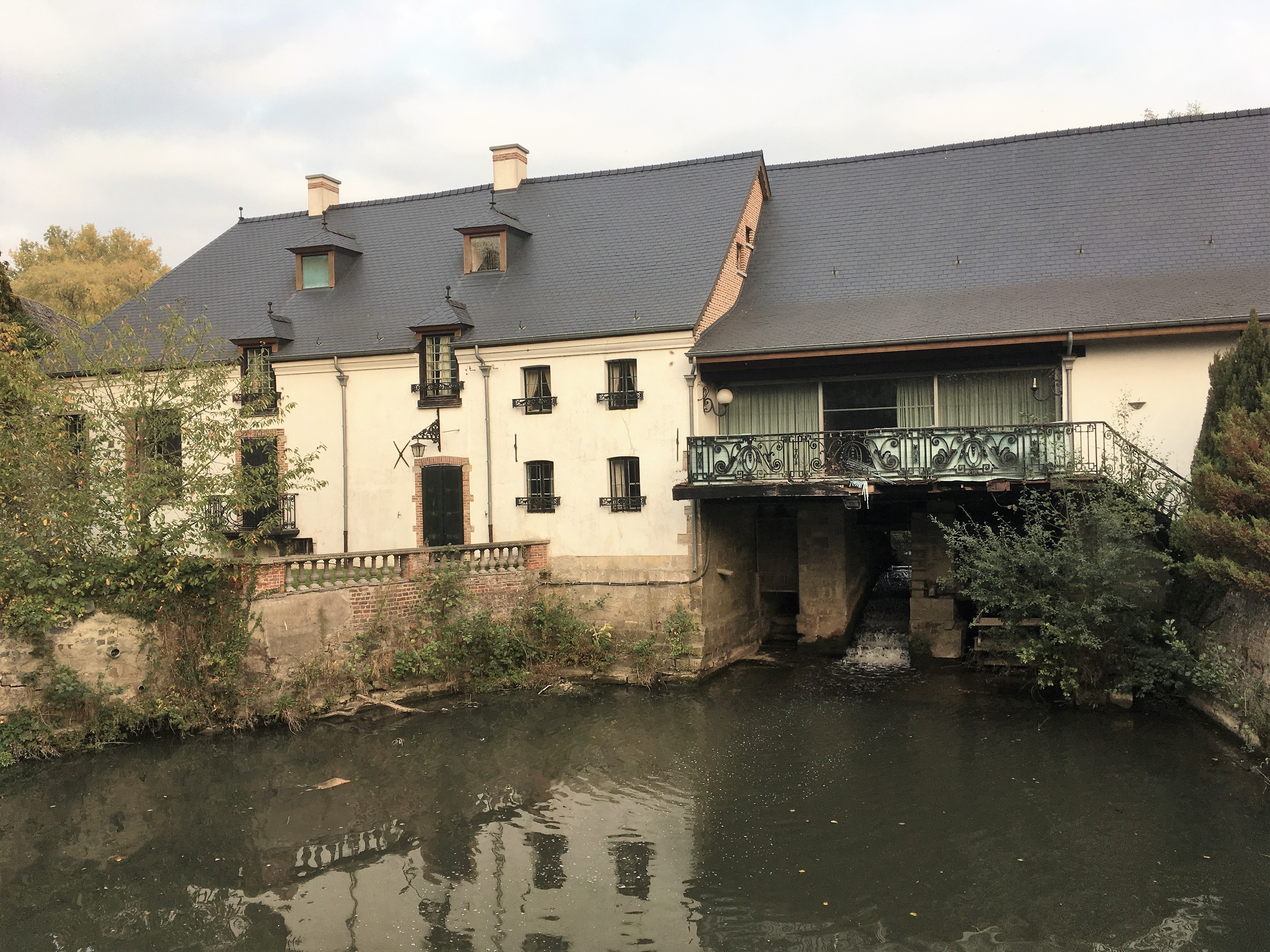 Zicht op Bellemolen vanaf Stationsstraat